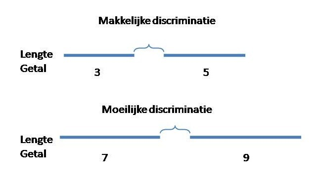 lijn getal